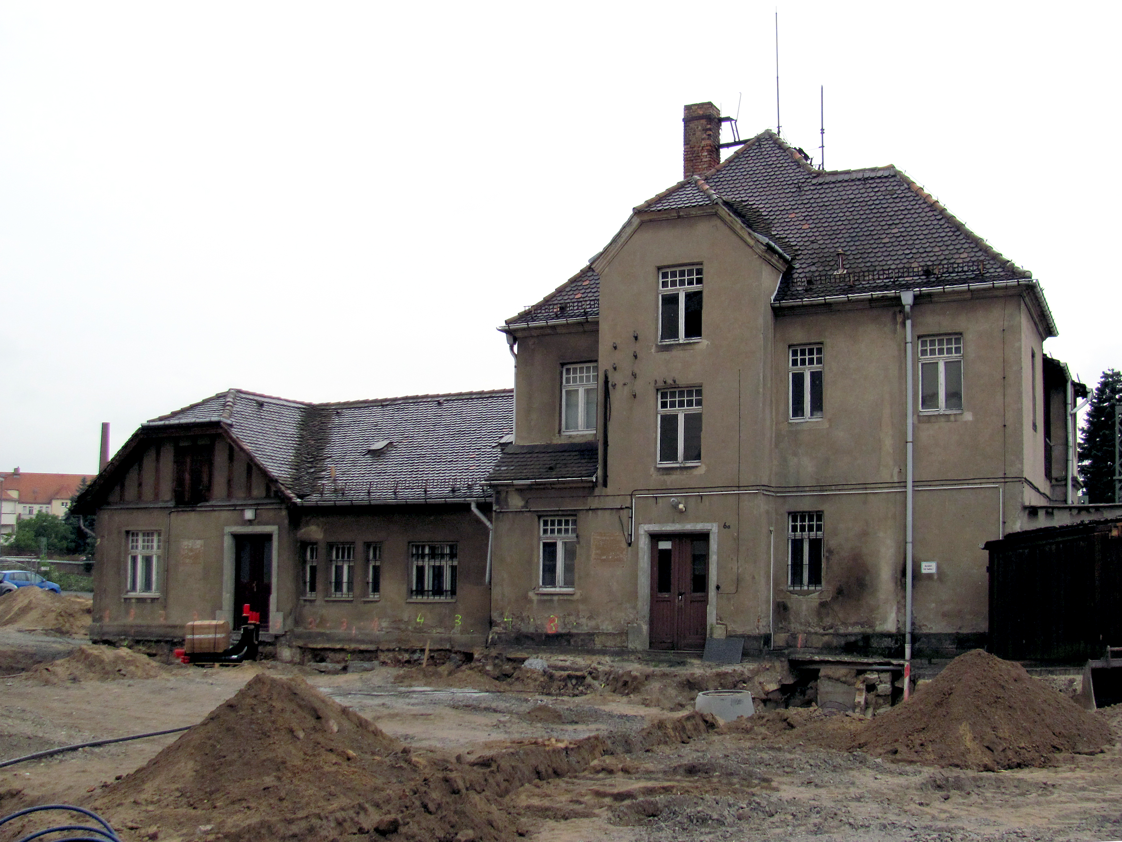 Radebeuler Rathaus, Hintergebäude